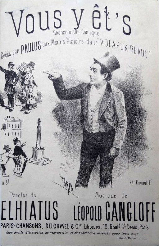 Couverture de la partition d'une chanson de la Volapuk-revue interprétée par Paulus